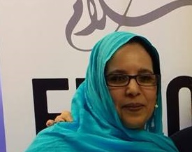 Foto de Fatma El Mehdi tomada en la 41ª Conferencia Internacional de Apoyo y Solidaridad con el Pueblo Saharaui (EUCOCO)